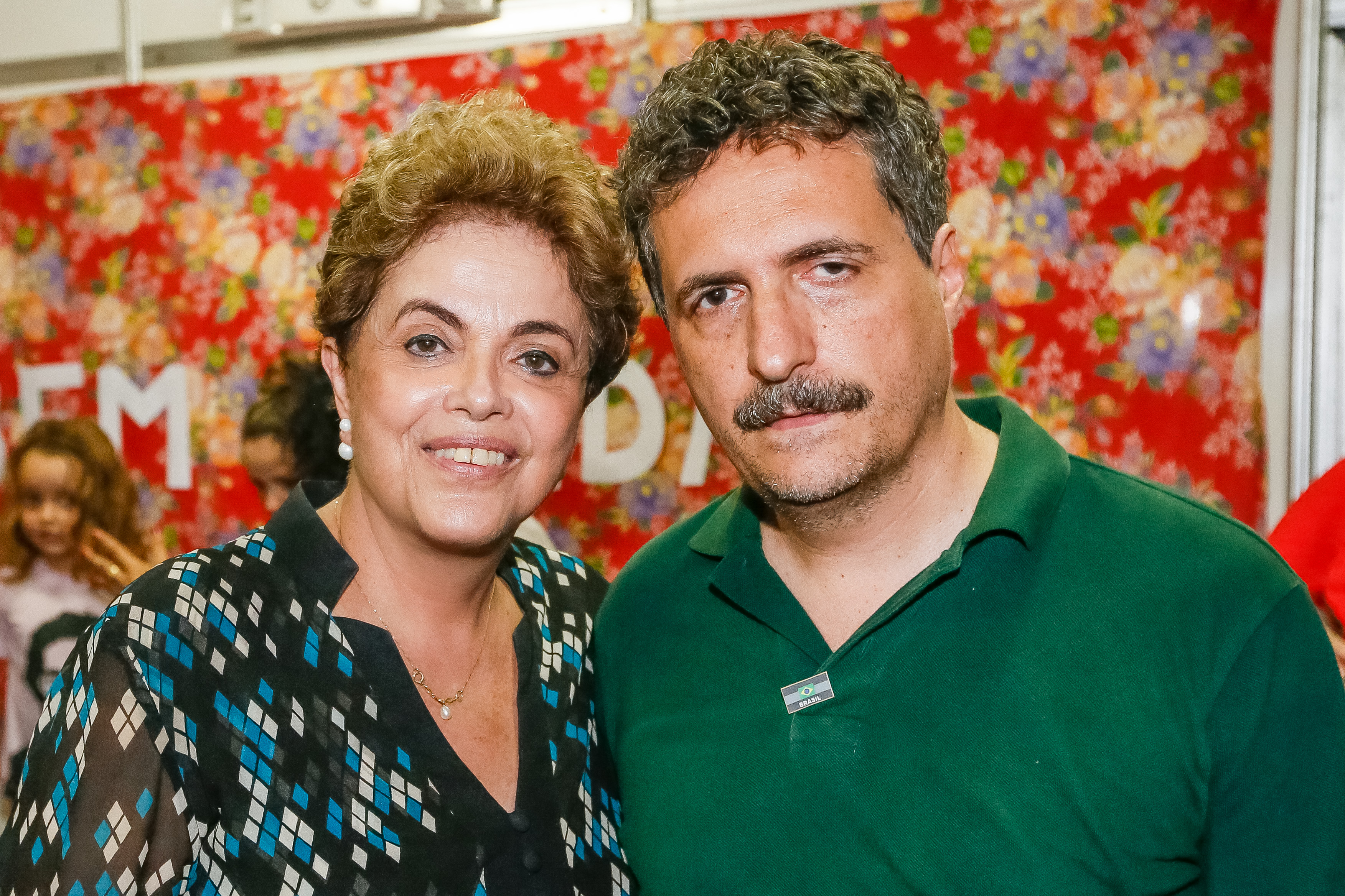 Presidenta Dilma Rousseff posa para foto com Elenco e o diretor do filme Aquarius, Kléber Mendonça, demonstram apoio à presidenta Dilma em Recife. (Recife - PE, 17/06/2016) Foto: Roberto Stuckert Filho/PR